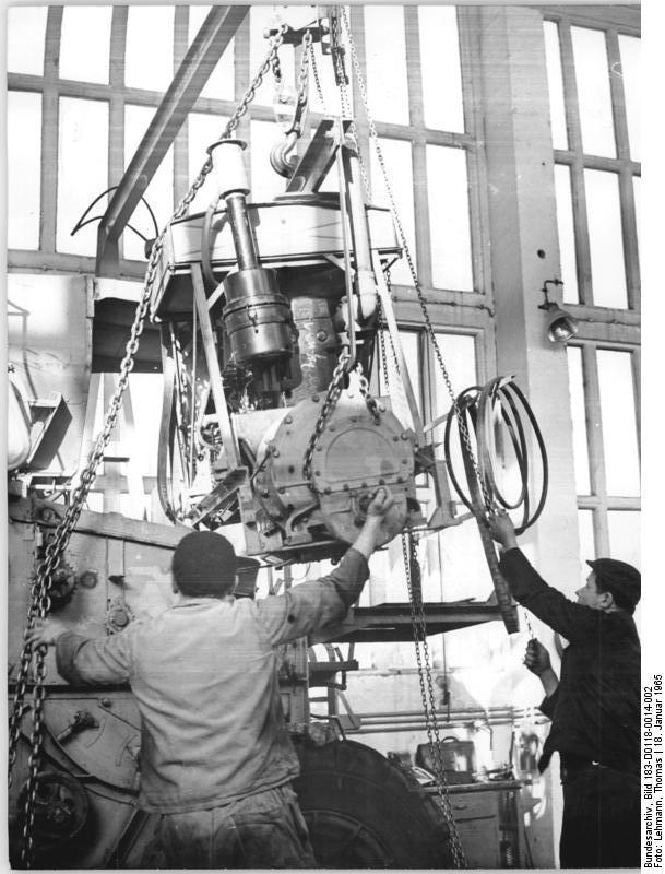 Montage eines Motors Zentralbild Lehmann 18.1.1965 Mähdrescherreparatur im Taktverfahren In der Fließmethode werden in der Zentralwerkstatt dessen im Bezik Cottbus Mähdrescher für die Getreideernte 1965 generalüberholt.Täglich verläßt ein reparierter Mähdrescher die Werkstatt, in der diese landwirtschaftlichen Großmaschinen in sechs Hauptakten und fünf Nebenakten demontiert, repariert und wieder montiert werden. Bis zum Beginn der Ernte werden in dieser Werkstatt noch 179 Mähdrescher überholt. Unser Bild zeigt die Landmaschinenschlosser Heinz Stahn und Gerhard Garbe bei der Montage eines Motors.